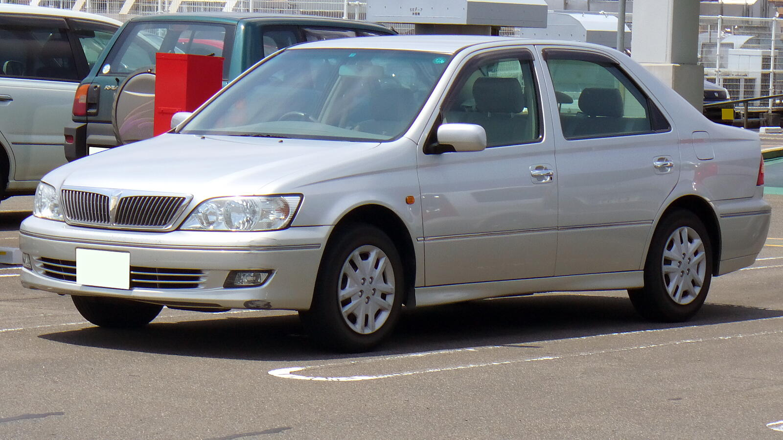 トヨタ・ビスタ（5代目）